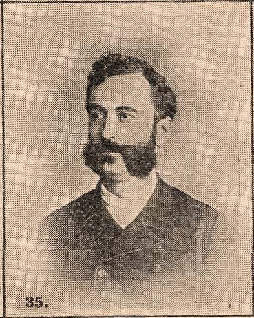 Schmidt Dezső alszolgabíró (füzéri járás)